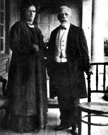 El general Eloy Alfaro Delgado (presidente de Ecuador), y su esposa Ana Paredes Aosemena. Quito, 1910.